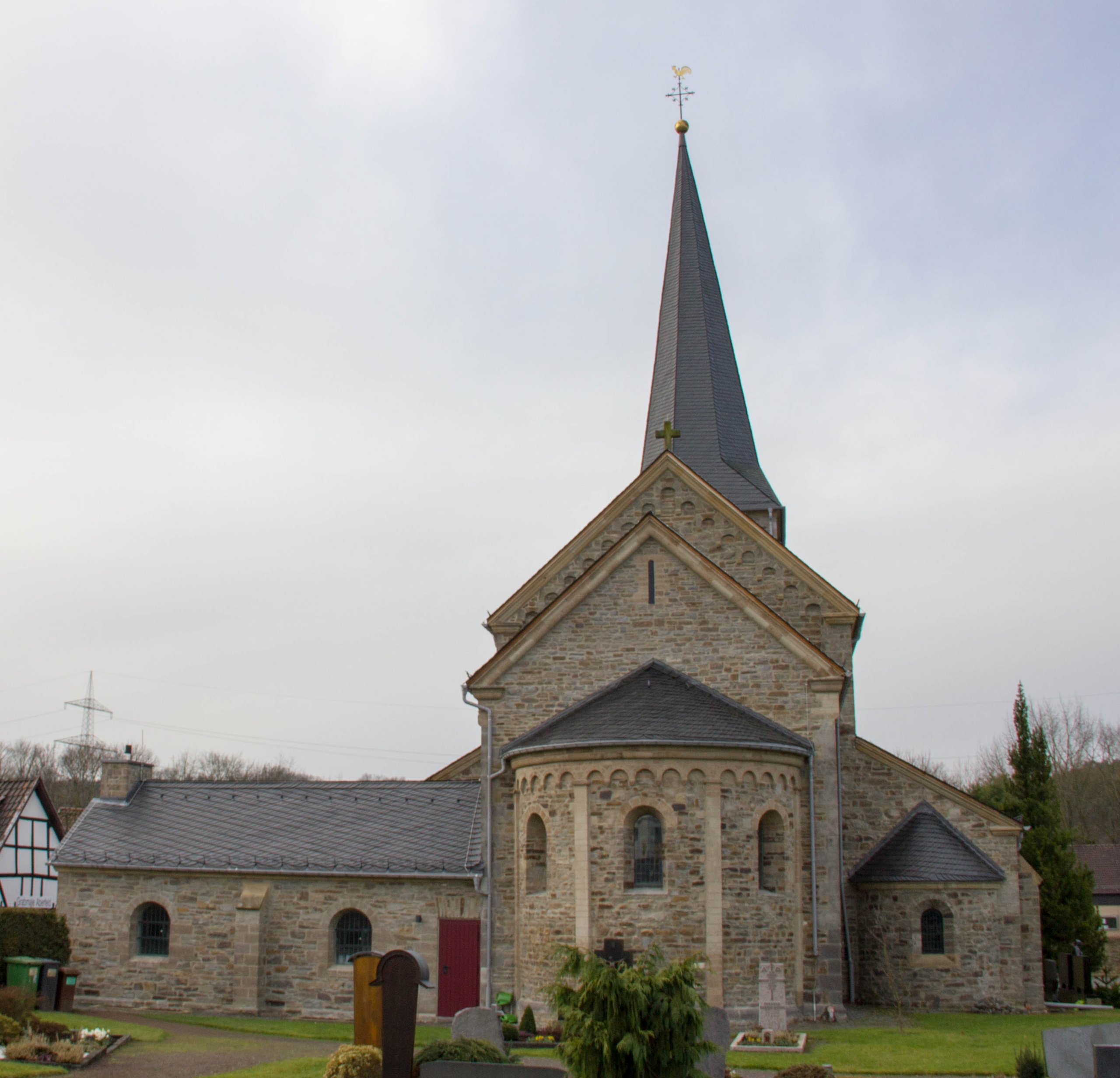 Katholische Pfarrkirche „Sankt Johannes" in Lohmar - Ort